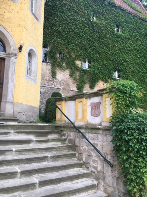 Schlosstreppe mit Wappen